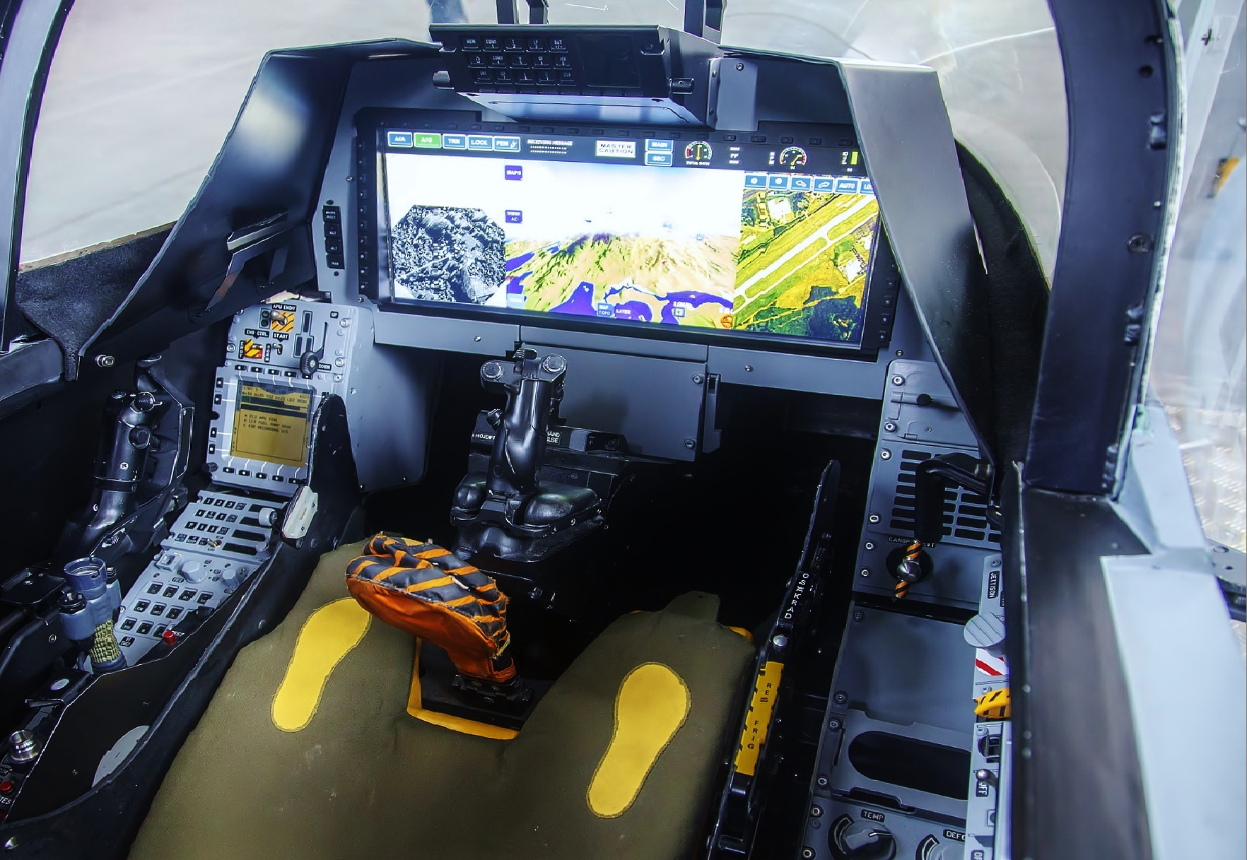 Cabina con pantallas digitales del Saab Gripen NG